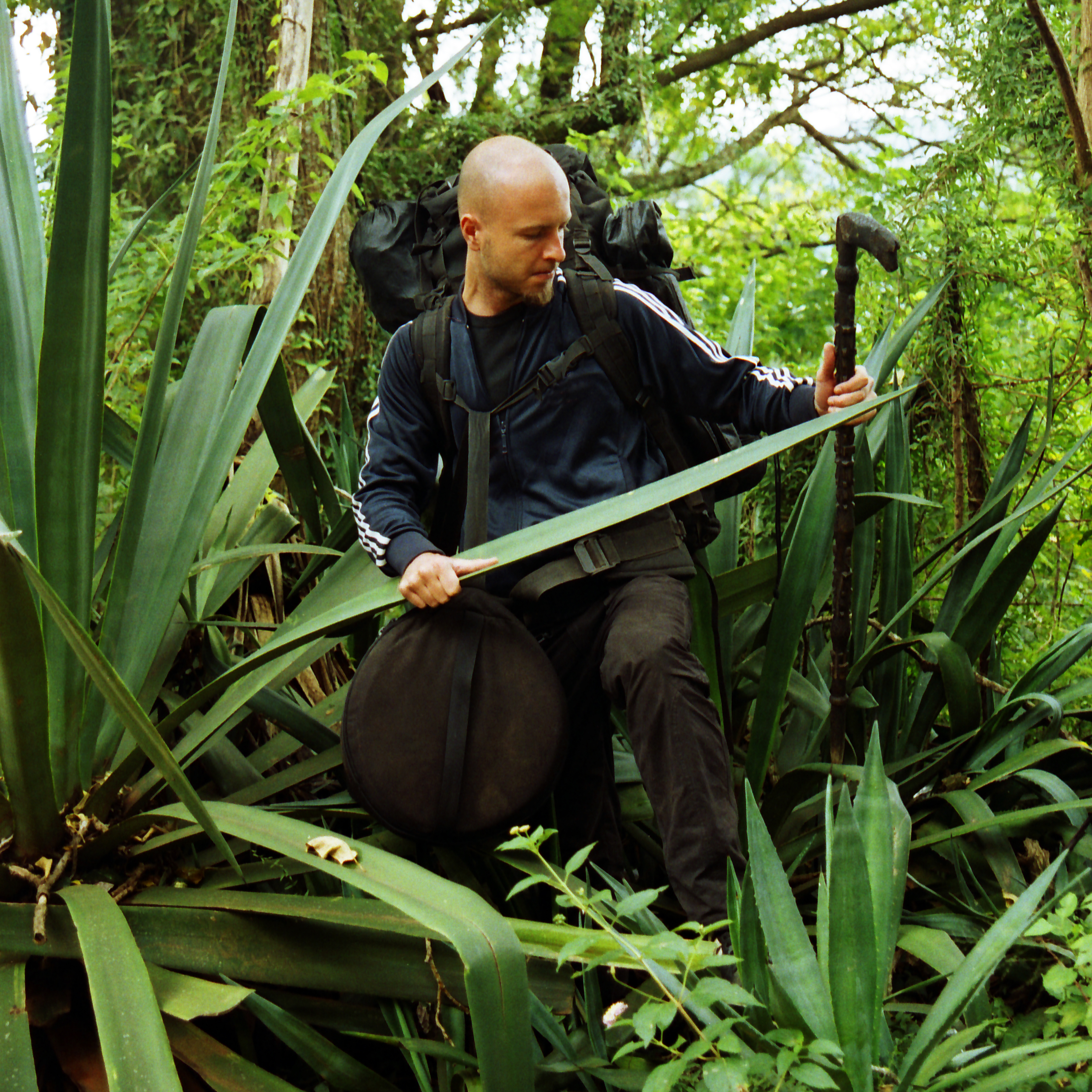 Dr. Ondřej Havelka v rovníkové Africe při cestě za unikátními domorodými etniky.